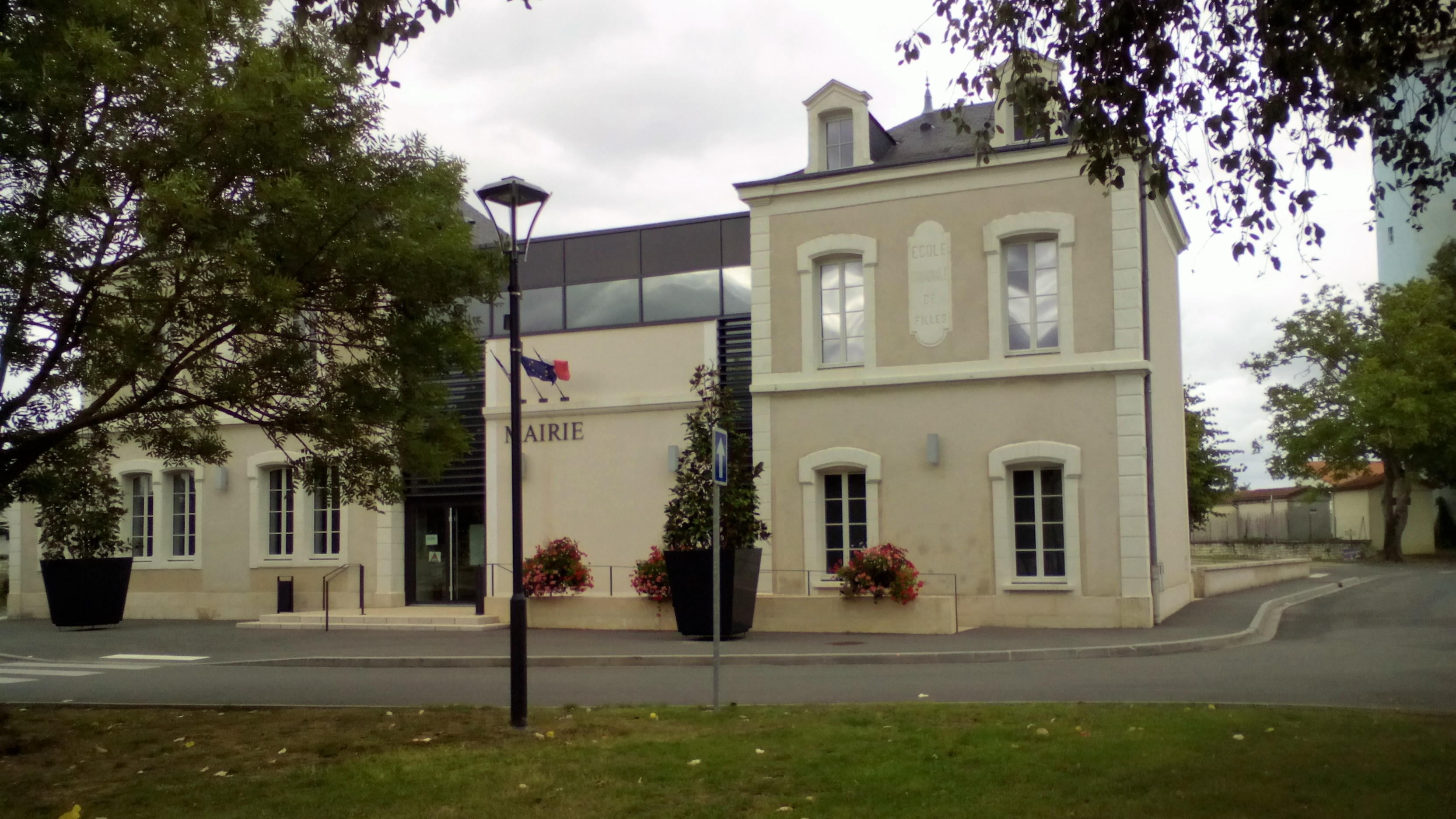 Mairie de la commune de Beaumont-Saint-Cyr